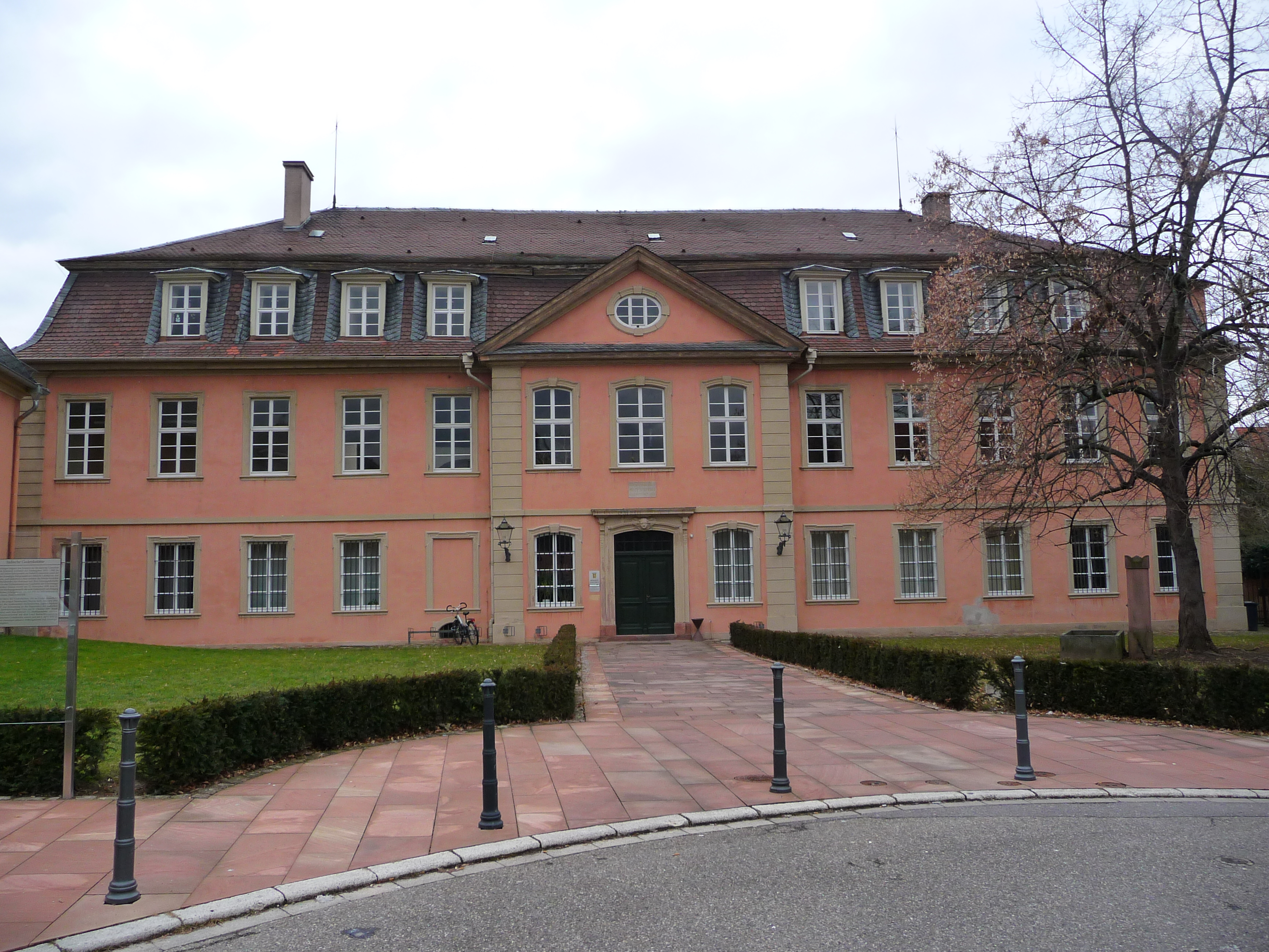 Amtsgericht in Schwetzingen (Rhein-Neckar-Kreis)